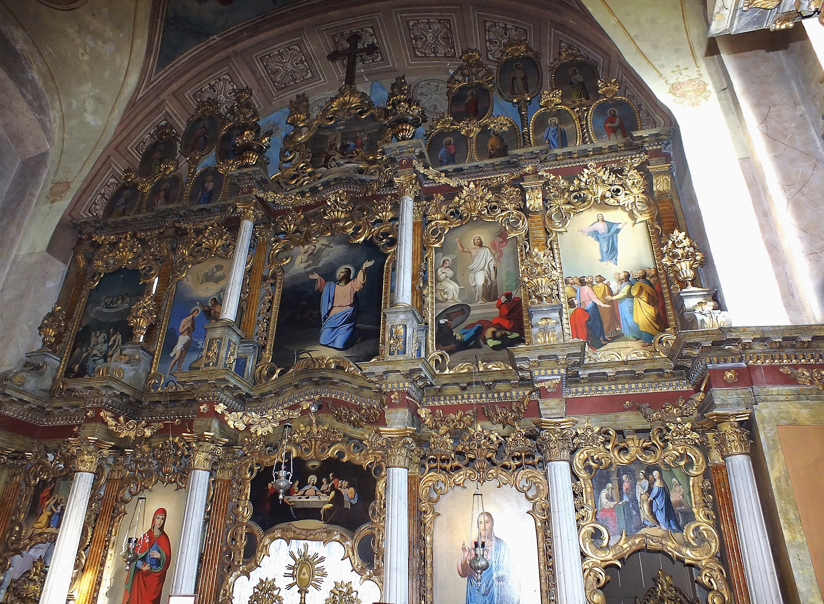 Иконостас Српске Православне цркве Ваведења Пресвете Богородице у Врбасу урадио Ј. Кистнер, 1862. године...